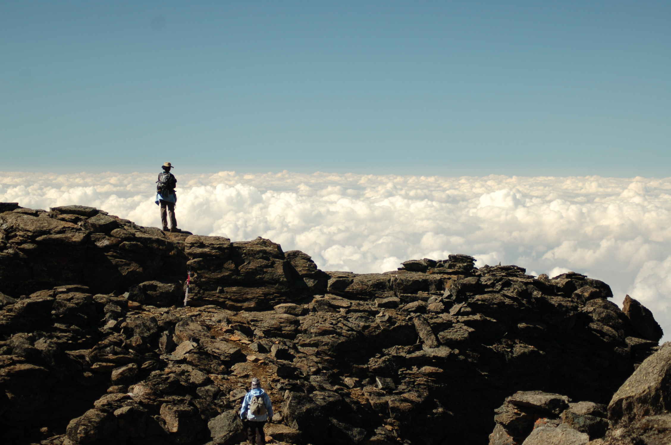 பிப்ரவரி 2009 இல் கிளிமஞ்சாரோ மலை ஏறும் வழியில் கற்குழம்புப் பாறை (Lava Tower, லாவா டவர்) என்னும் இடத்தில் உள்ள முகாமில் இருந்து எடுத்த படம். படத்தில் செல்வாவின் மனைவியும் மகளும்.